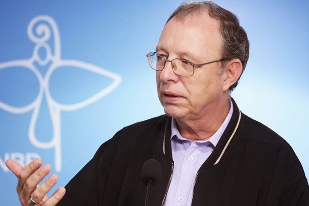 Dom Flávio